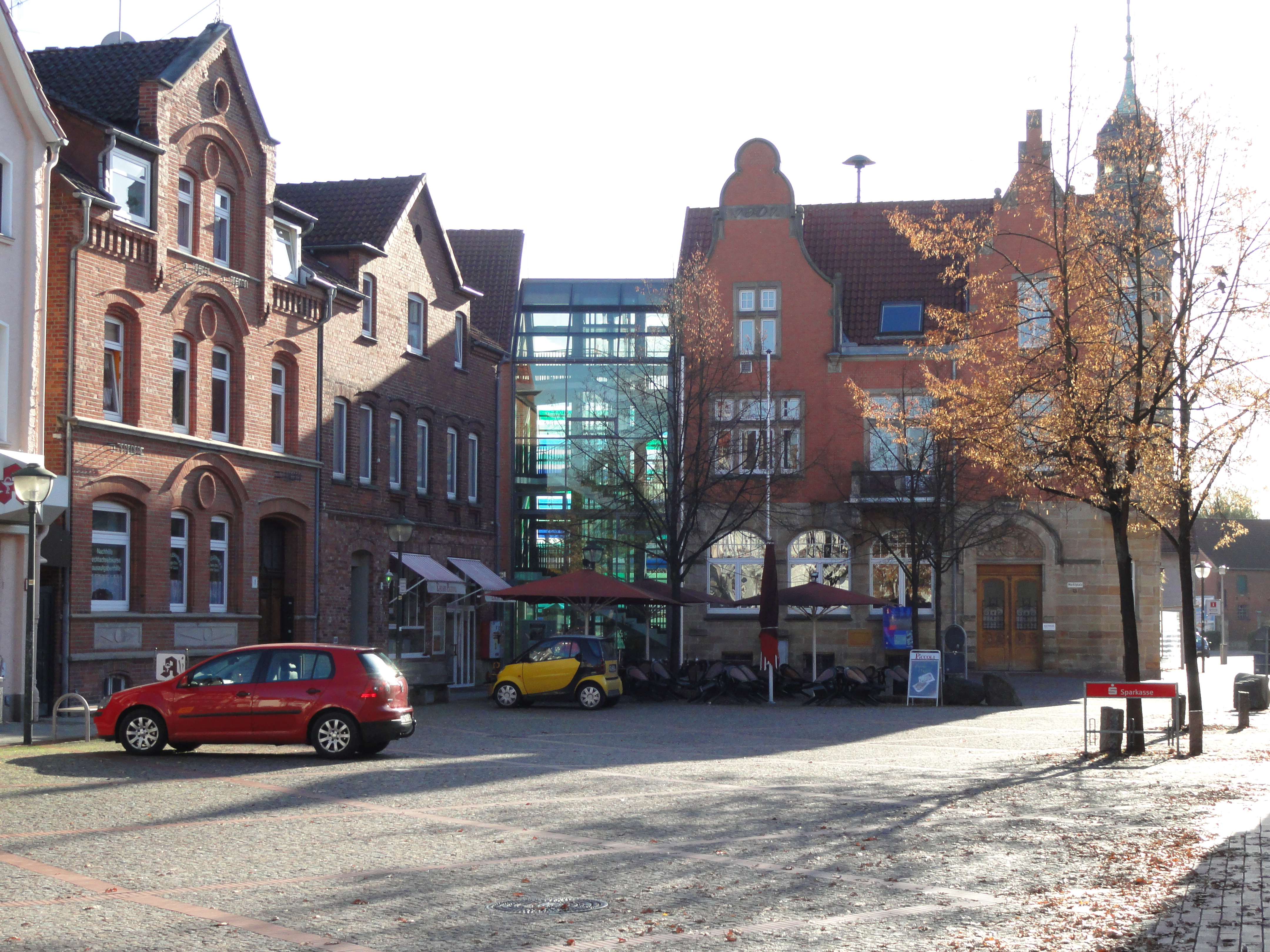 Marktplatz mit Frontblick auf den alten Rathausteil